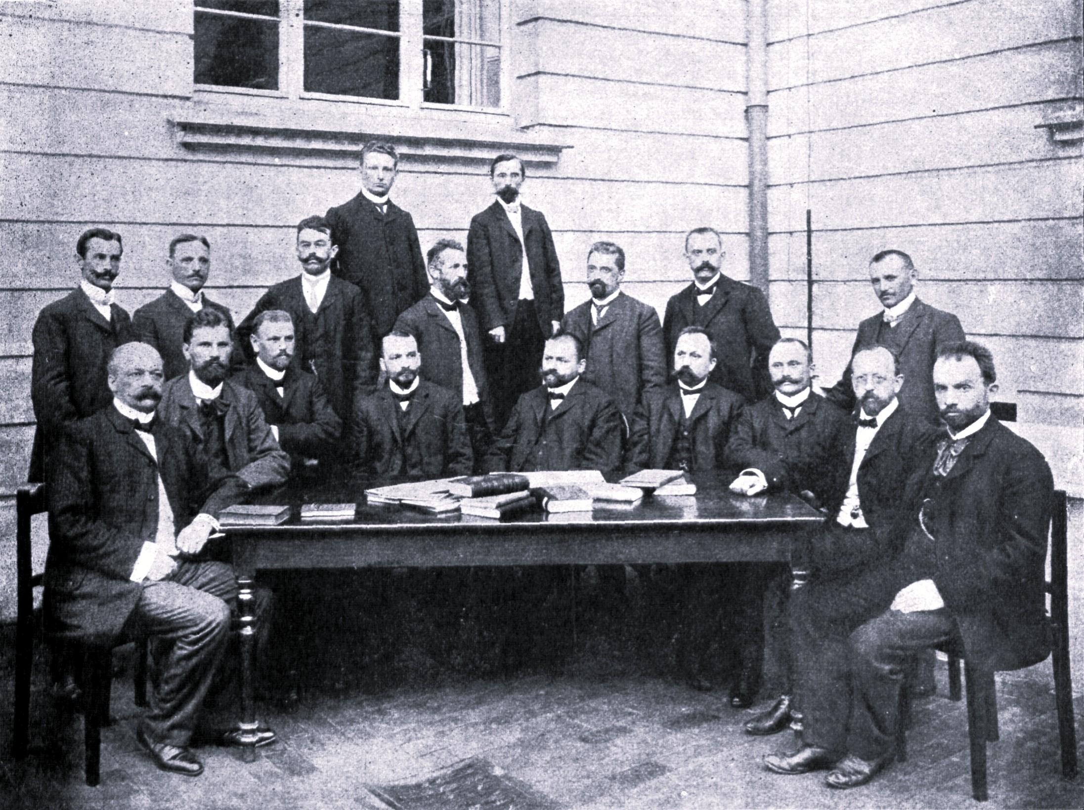 Das Lehrerkollegium des Lübecker Schullehrer-Seminars im Jahr des Hundertjährigen Bestehens des Seminars. Sitzend von links nach rechts: Georg Lüker, Heinrich Jürgens, Carl Heyck, Oberlehrer Kuhn, Direktor Möbusz, August Steyr, August Bahrs, Carl Eberding, Wilhelm Stahl Stehend von links nach rechts: (unten) Ludwig Benick, Hugo Detlefsen, Johannes Klöcking, Wilhelm Kersten, Wilhelm Peckelhoff, Wilhelm Holdorff, Erich Stammer, (oben) Gustav Eckhorst, Hermann Neupert